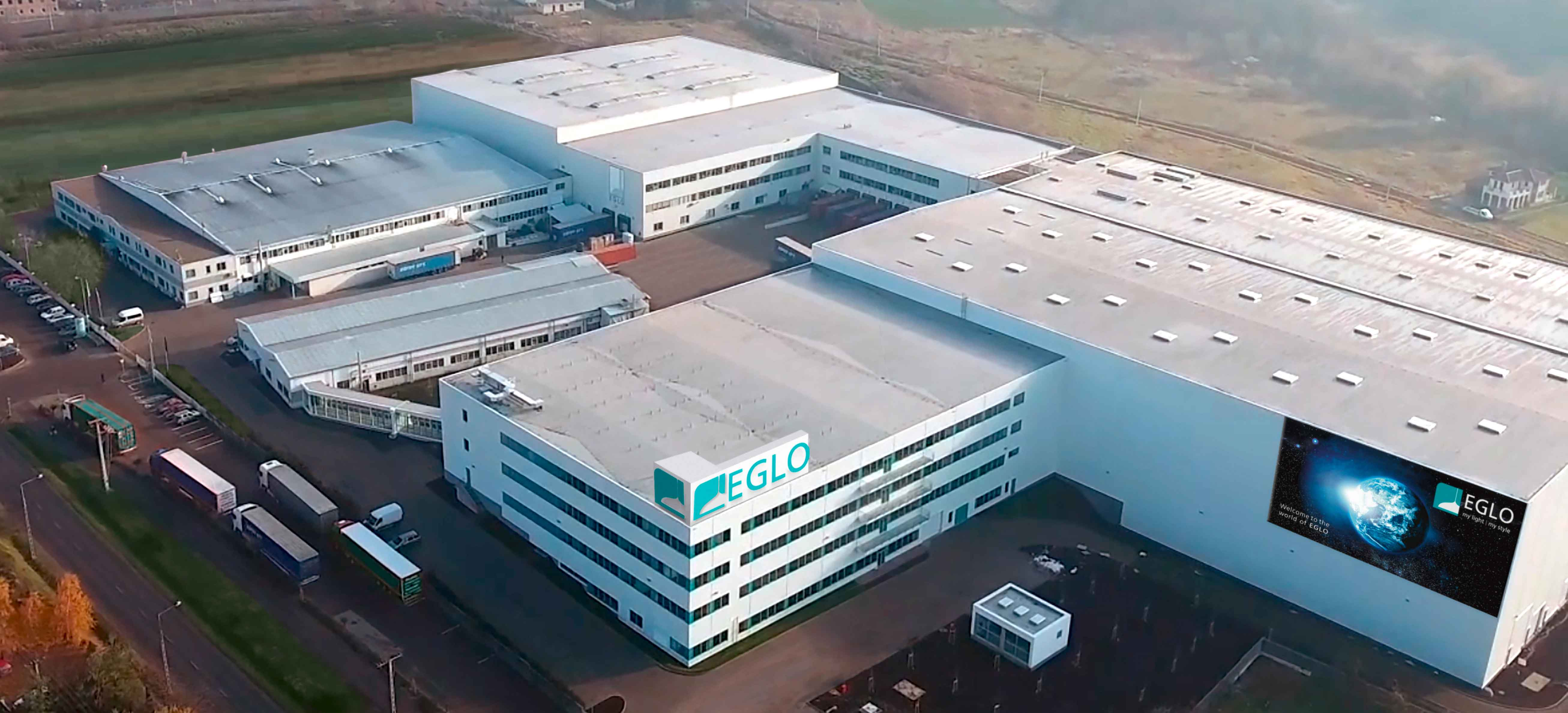 Standort in Paszto, Ungarn